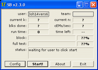 sob client1